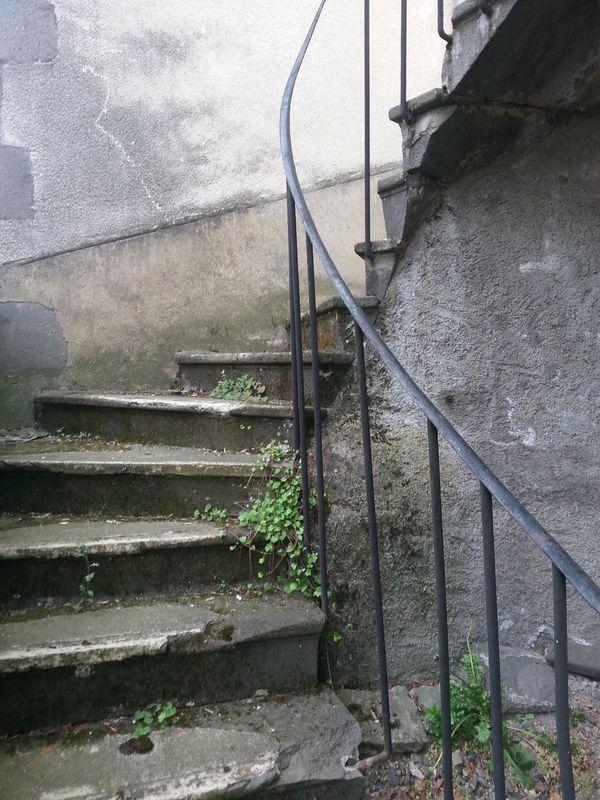 La cymbalaire (Cymbalaria muralis) poussant le long d'un escalier à Manzat